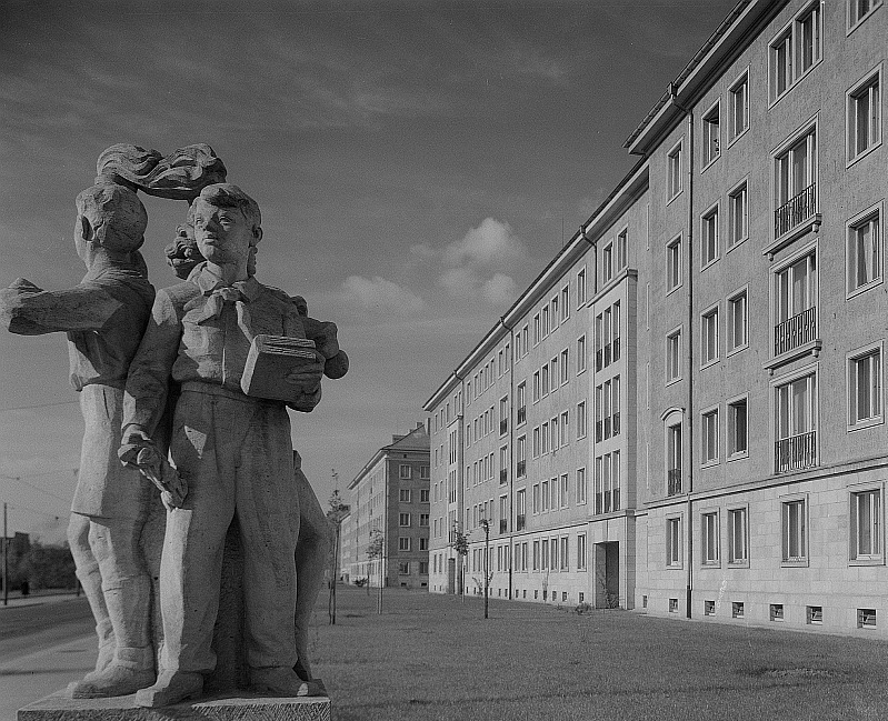 Original image description from the Deutsche FotothekDresden. Blick auf die Grunaer Straße mit Gruppenplastik "Junge Pioniere" (Karl Loose, 1953/54)